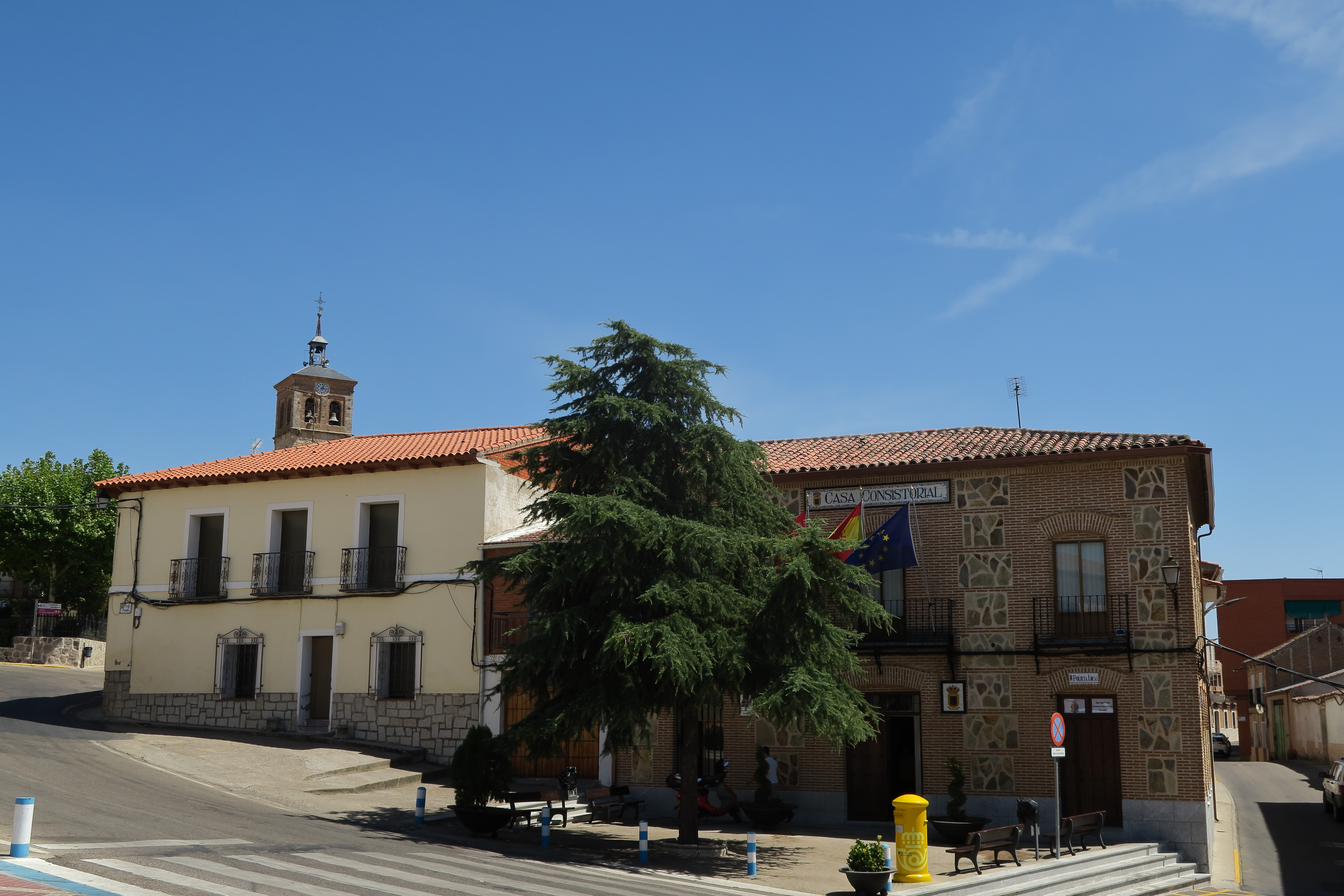 Novés, Casa Constistorial, plaza España